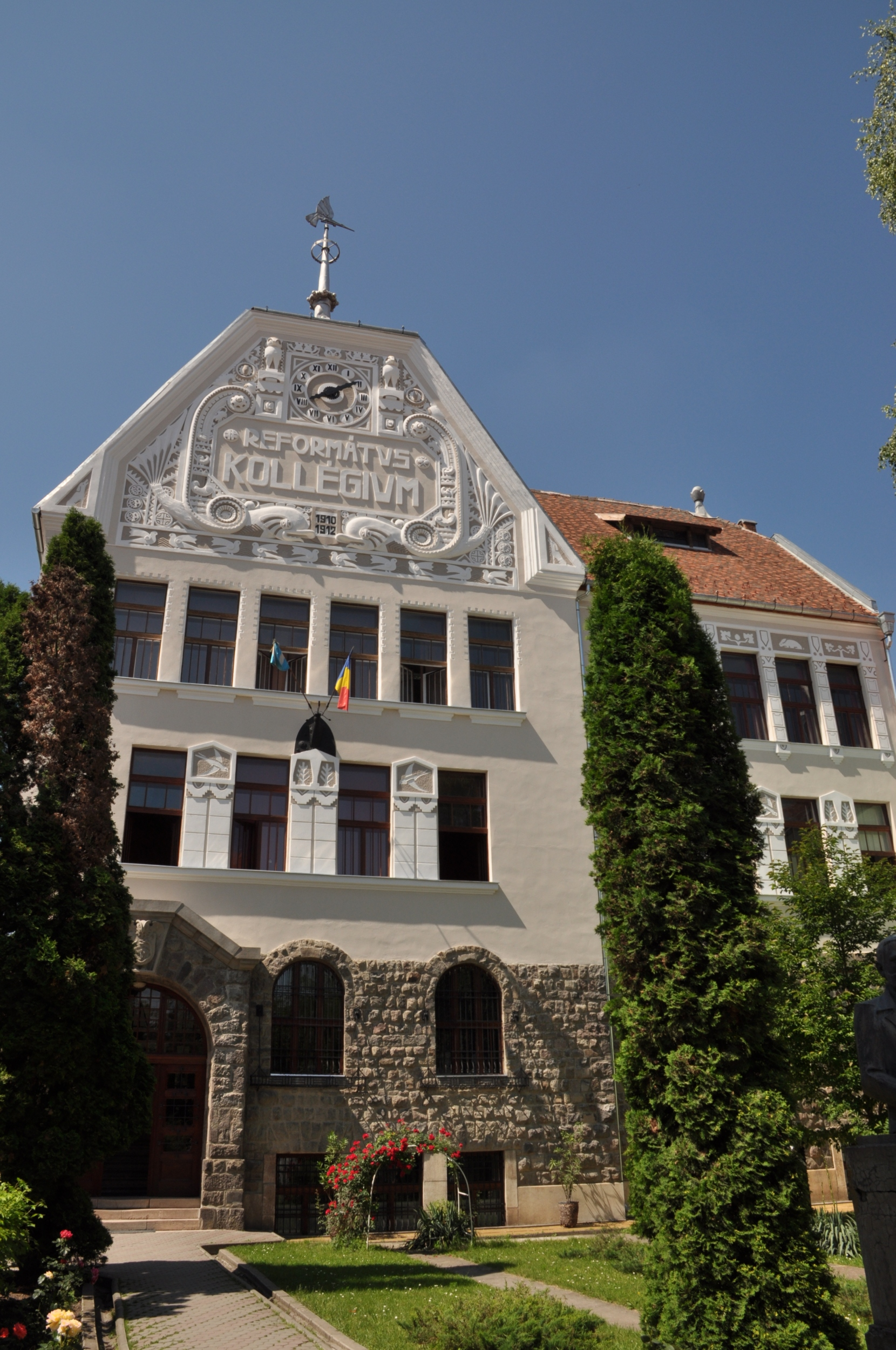 Liceul reformat "Baczkamadarasi Kis Gergely"